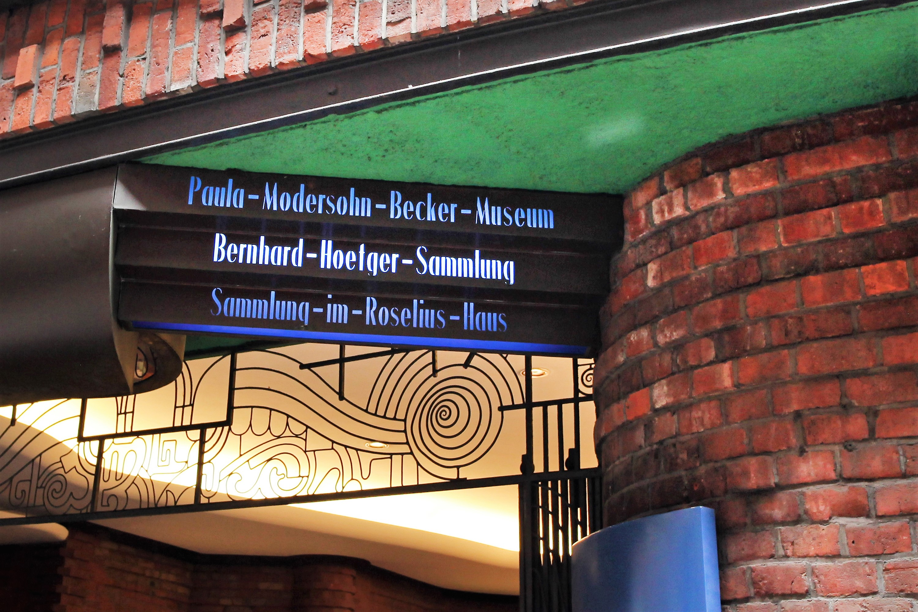 Schild am Eingang der Kunstsammlungen Böttcherstraße